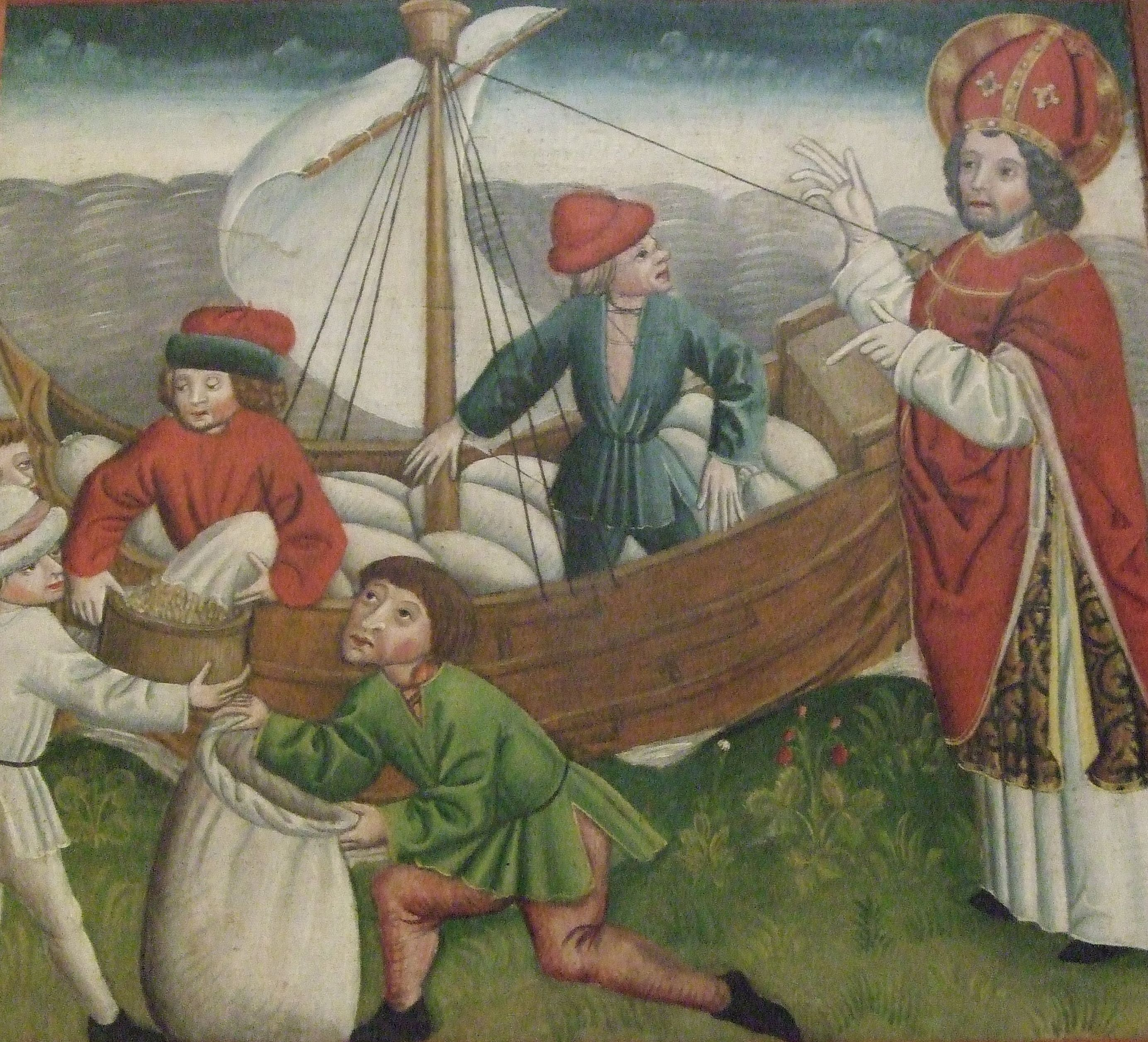 Von einem nicht mehr vollständig erhaltenen Nikolaus-Flügelaltar aus der Zeit um 1485, befinden sich an der Nordwand des Chores in der Kirche St. Mariae in Mühlhausen - Thüringen, die zwei restlichen Seitentafeln, auf denen zwölf Szenen aus dem Leben des Heiligen dargestellt werden. Hier eine Szene mit dem Kornwunder. Der Heilige bittet während einer Hungersnot bei der Entladung von für den Kaiser bestimmtem Getreide im Hafen um Getreide für Hungernde. Man erfüllt die Bitte und gibt etwas ab, die Getreidemenge auf dem Schiff vermindert sich dadurch aber nicht.